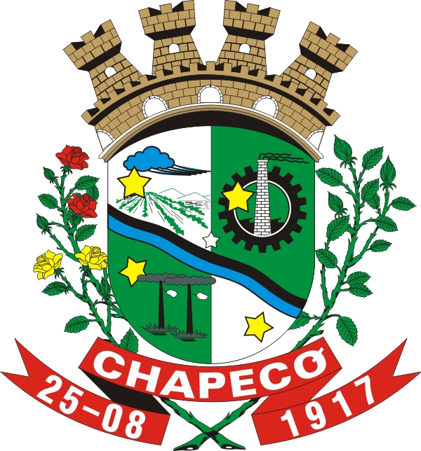 Blason de la municipalité de Chapecó - SC - Brésil